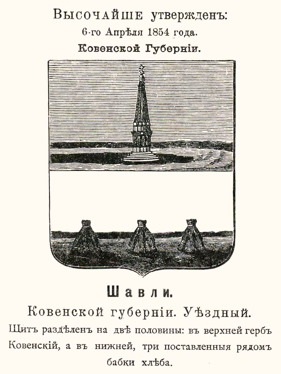 Official Russian Empire coat of arms. Kovno Governorate. Герб Российской Империи города Шавли (лит. Шауляй) Ковенской (лит. Каунасской) губернии с официальным описанием в Гербовнике Винклера.